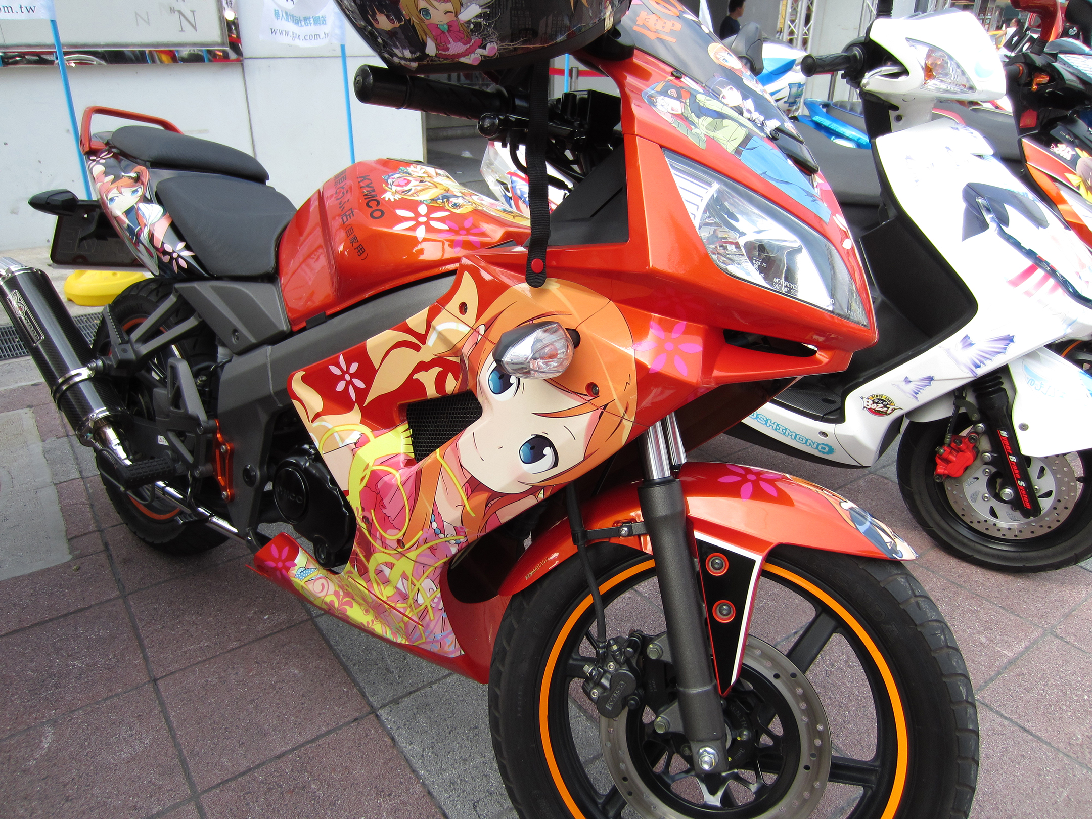 2011巴哈市集，《我的妹妹哪有這麼可愛！》光陽痛機車。